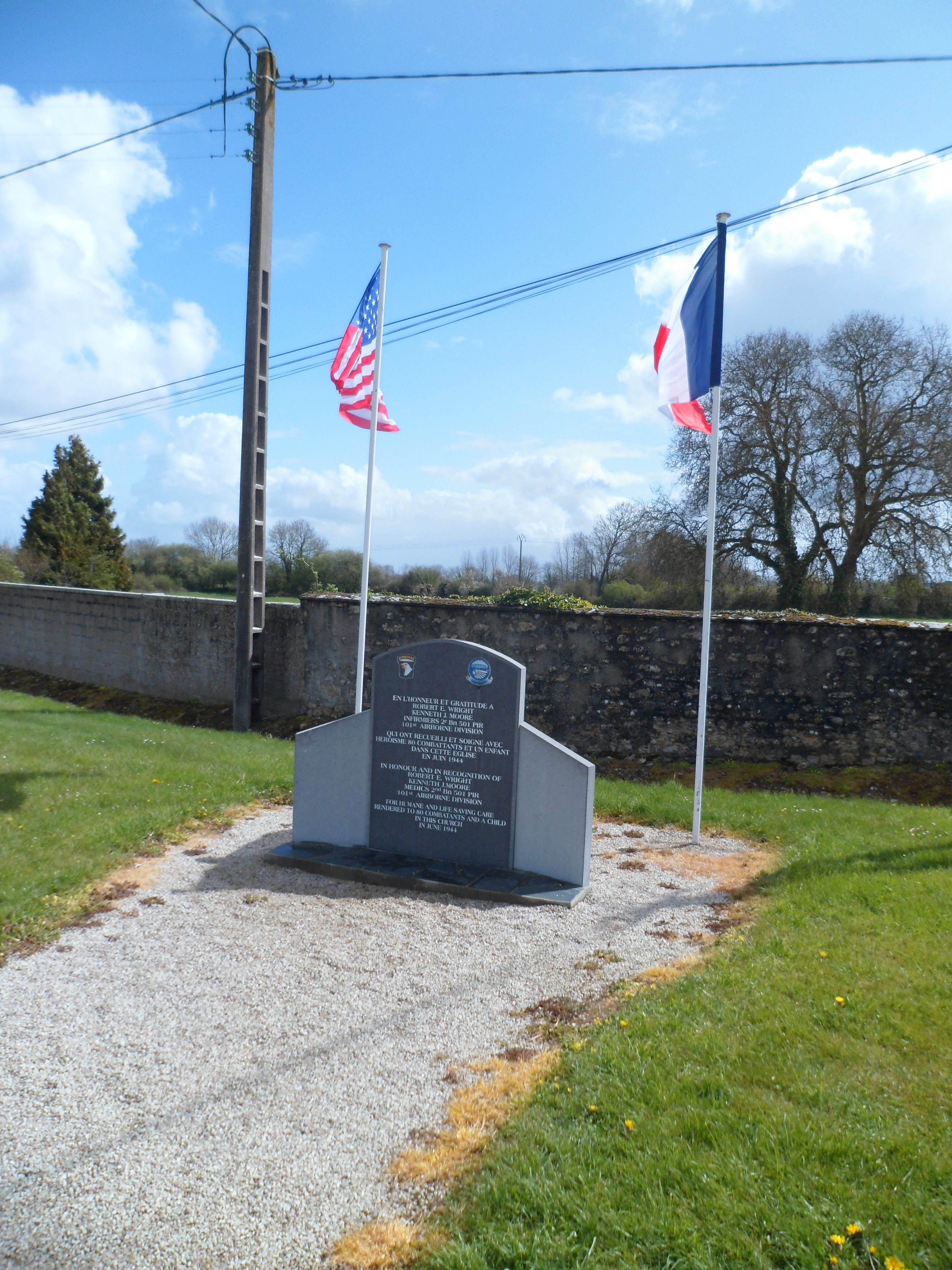 stele en l'honneur de Robert E Wrigt et Kenneth J Moore, infirmiers de 101 airborne qui ont soigné 80 personne en 1944 Angoville-au-Plain